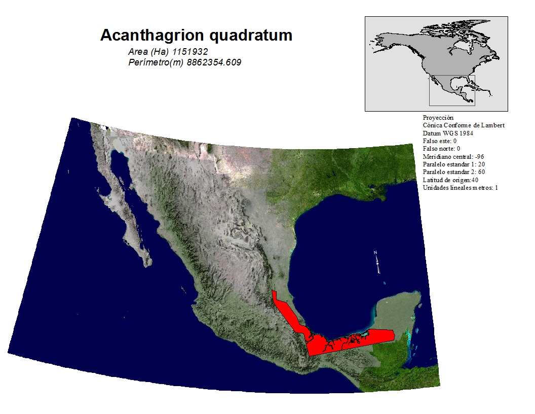 Polígono de distribución de A. quadratum